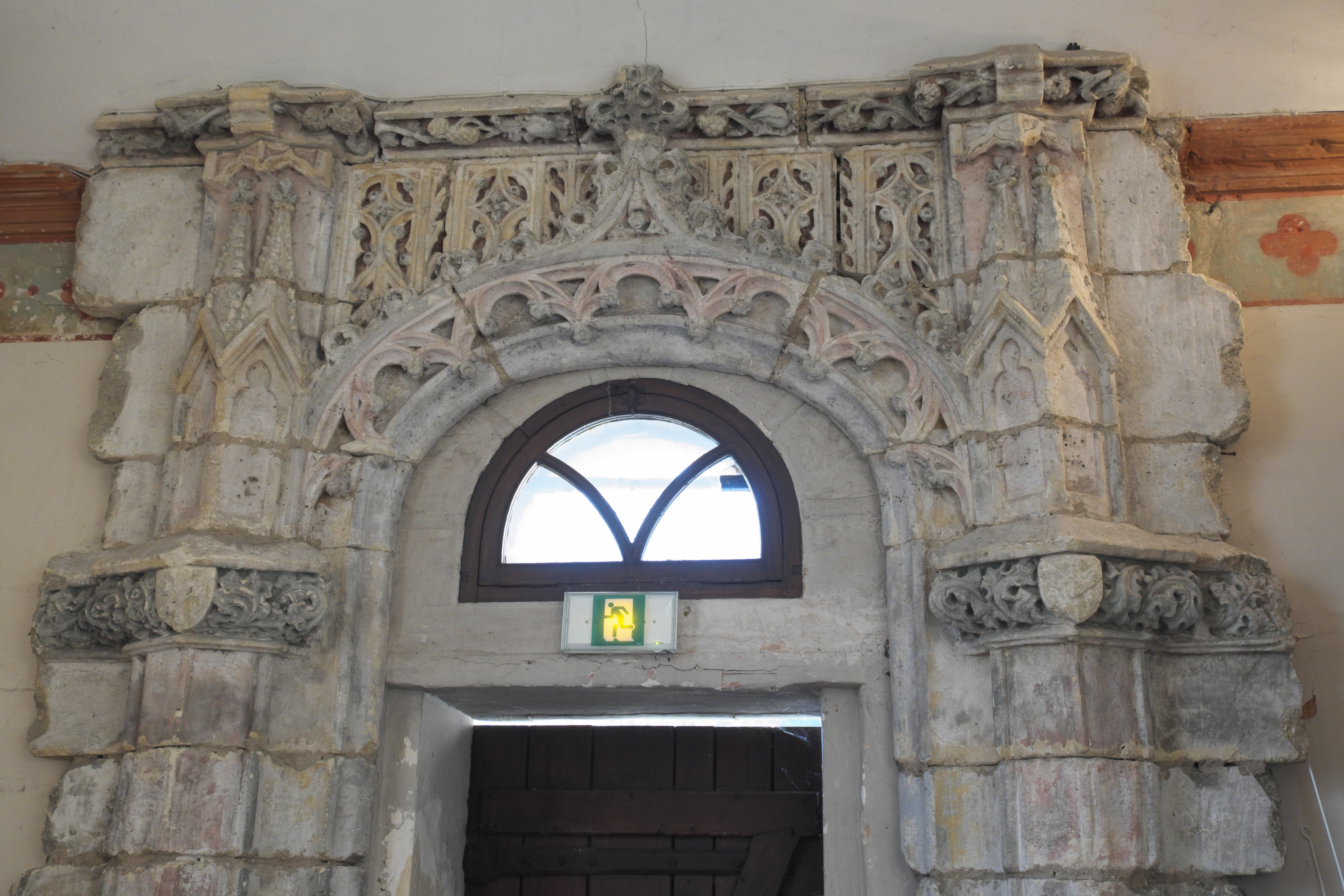 Katholische Kapelle Saint-Léonard, ehemalige Pfarrkirche, in Croissy-sur-Seine im Département Yvelines (Île-de-France/Frankreich), südliche Seitenkapelle, Portal im Flamboyant-Stil